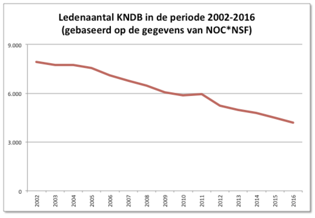 grafische weergave van de ledenaantallen van de Koninklijke Nederlandse Dambond in d periode 2002 t/m 2016 gebaseerd op de door NOC*NSF verstrekte cijfers